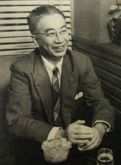 野尻清彦